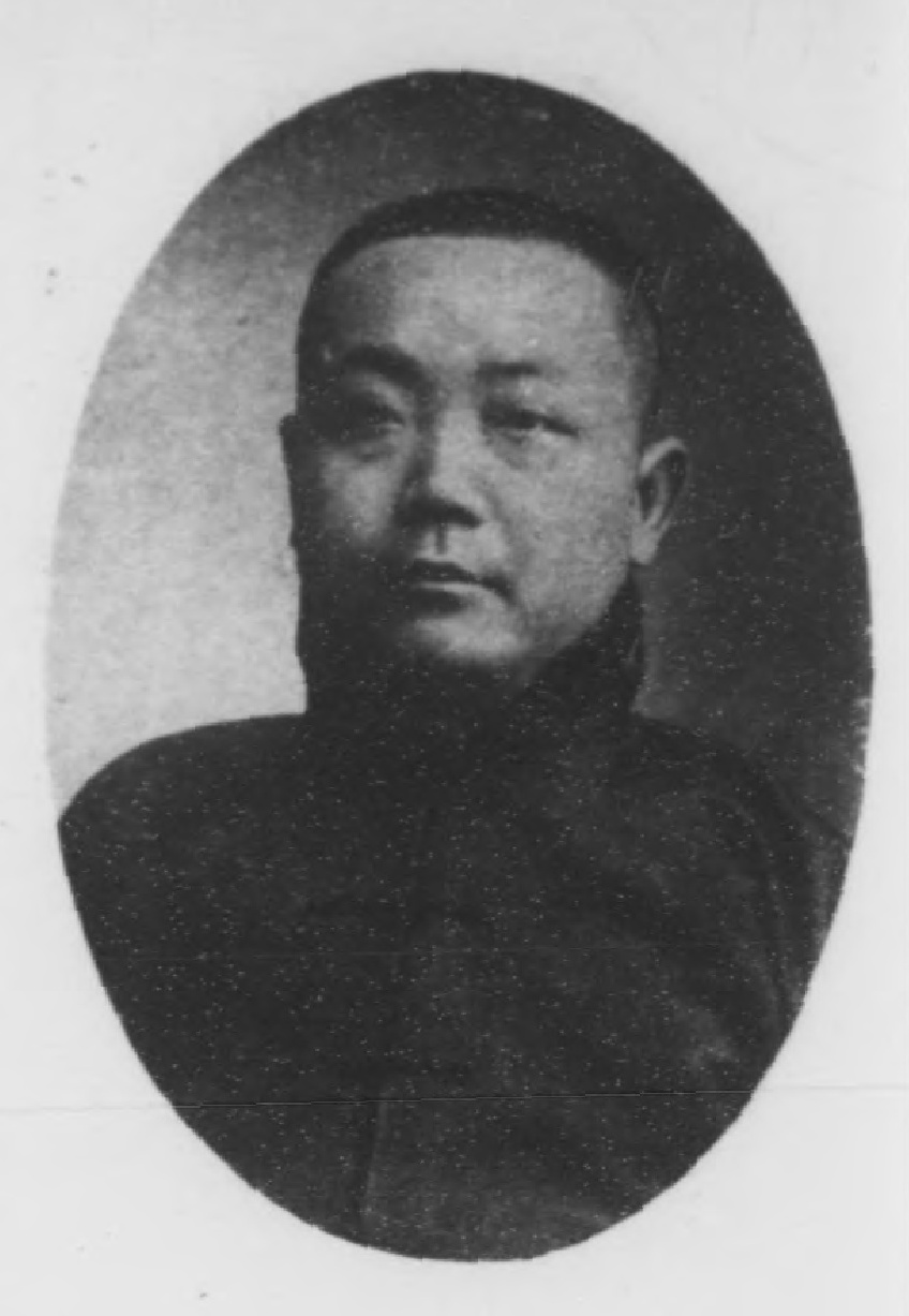 光緒甲辰科進士小像